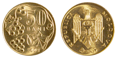 50 Bani - Moldova